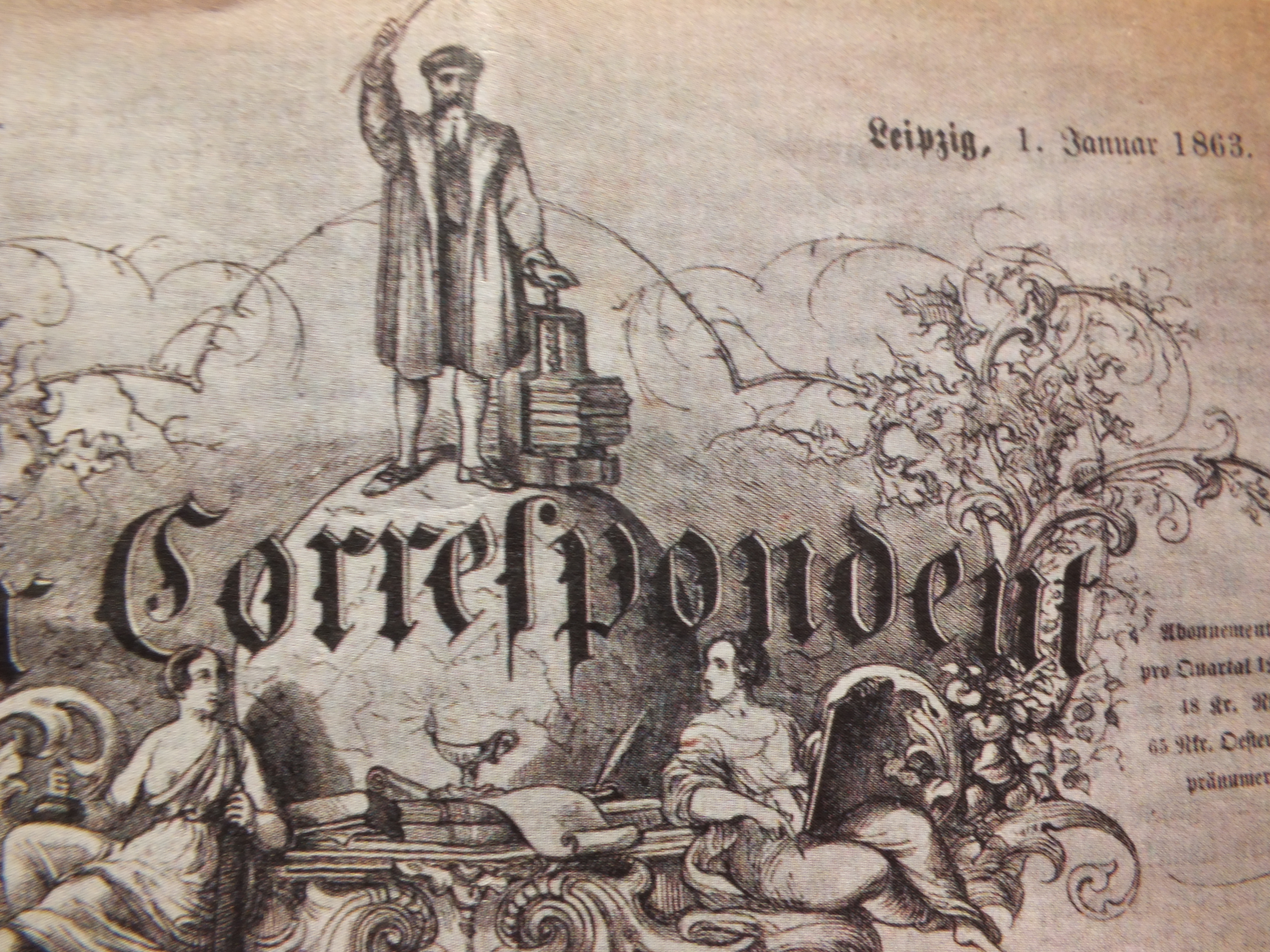 Fotoauszug aus „Der Correspondent“, 1. Ausgabe vom 1.1.1863